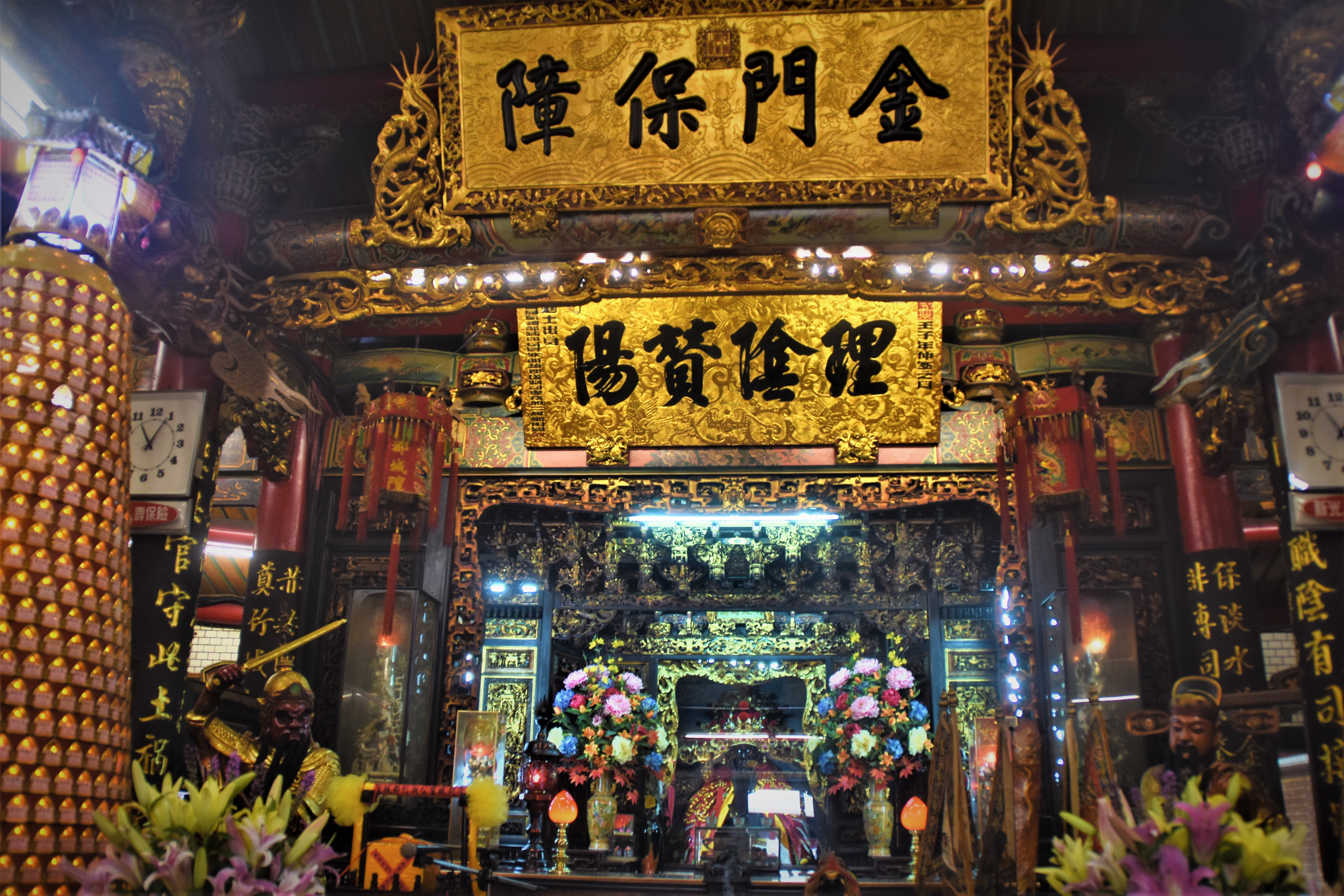 中文（台灣）: 新竹市文化古蹟城隍廟